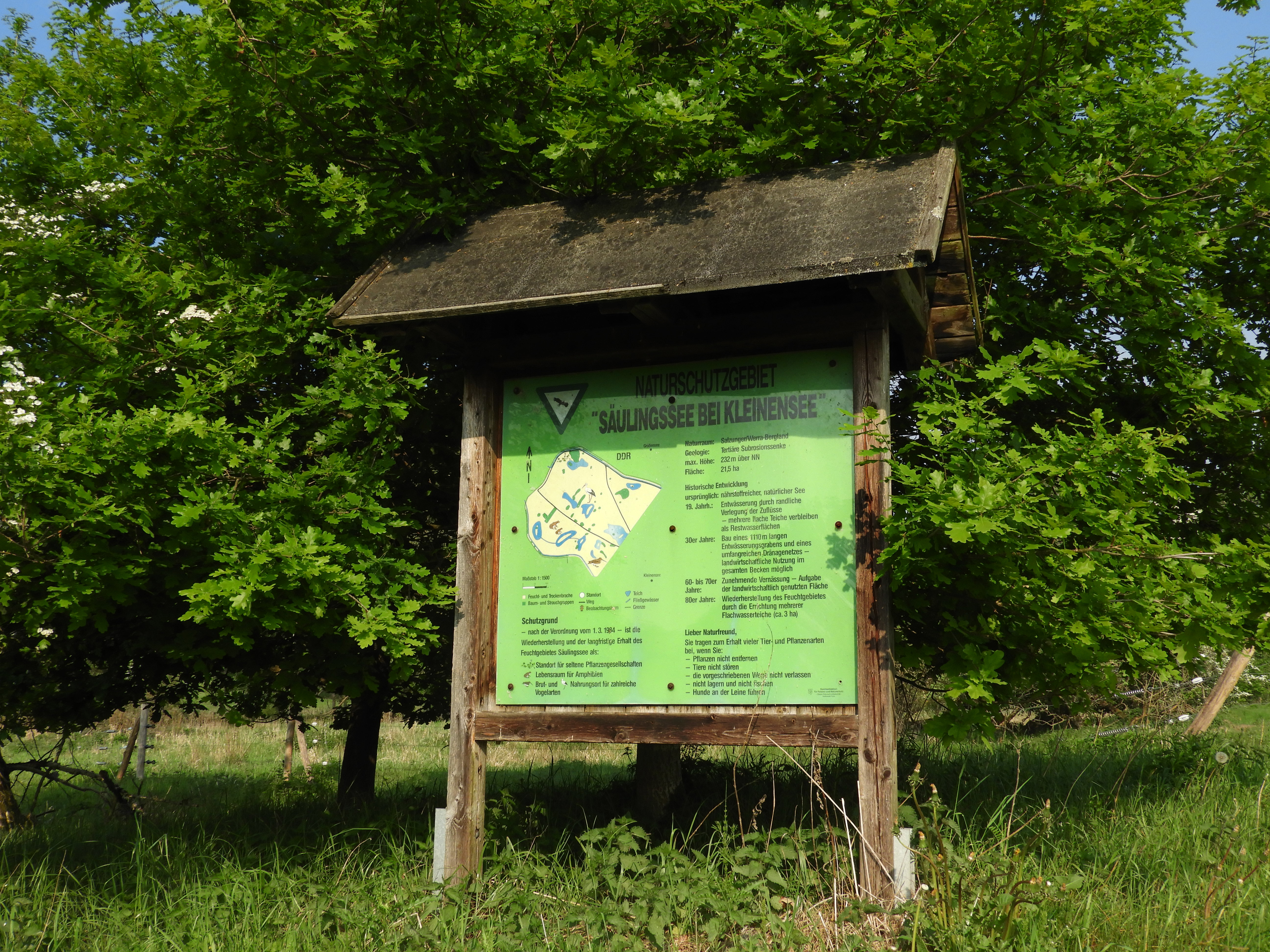 Hinweistafel am Rundweg im Schutzgebiet. Der "Säulingssee bei Kleinensee" ist ein Naturschutzgebiet westlich des Heringer Stadtteils Kleinensee im Landkreis Hersfeld-Rotenburg, unmittelbar an der Landesgrenze zu Thüringen. Mit einer Größe von rund 2,5 Hektar hat das Naturschutzgebiet den WDPA-ID-Code 165337 und als gleichnamiges Fauna-Flora-Habitat-Gebiet die Nummer 5025-302.